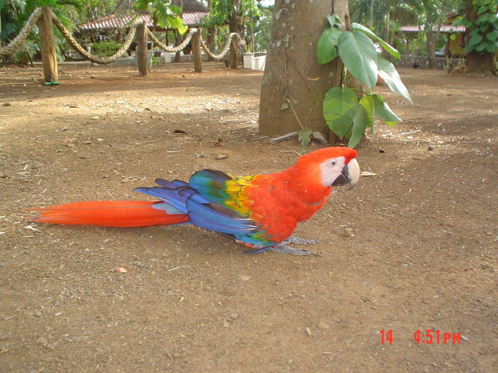 Ara macao